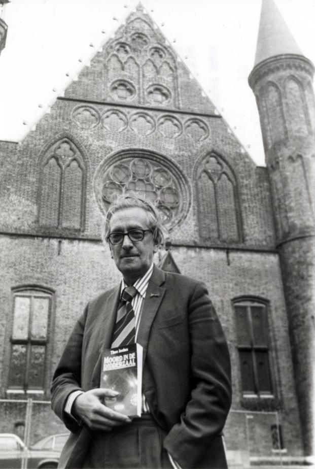 Joekes, T.H. ( VVD). Presentatie van het boek "Moord in de Ridderzaal" van VVD-Twede Kamerlid Joekes. Foto: Joekes met zijn boek op het Binnenhof, voor de Ridderzaal. Nederland, Den Haag, 18 november 1980.